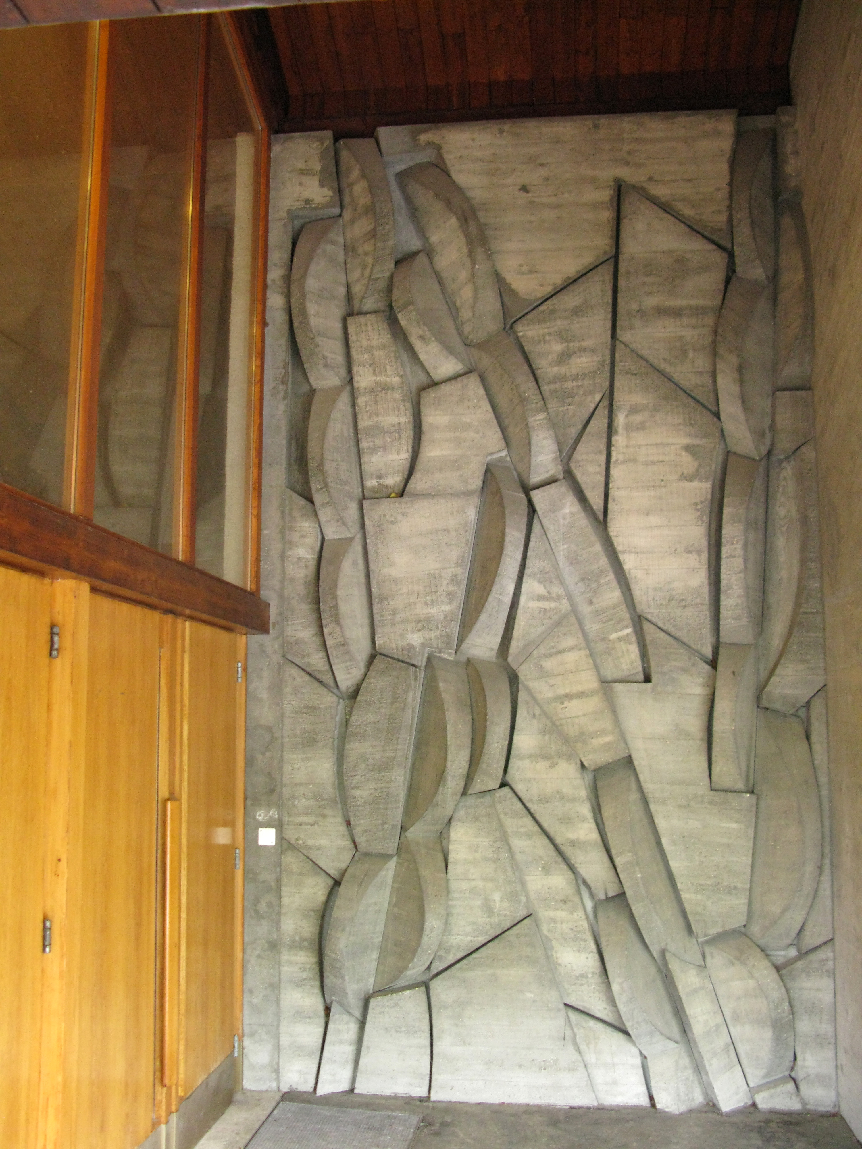 Kornfeldkirche in Riehen, Relief am Eingang